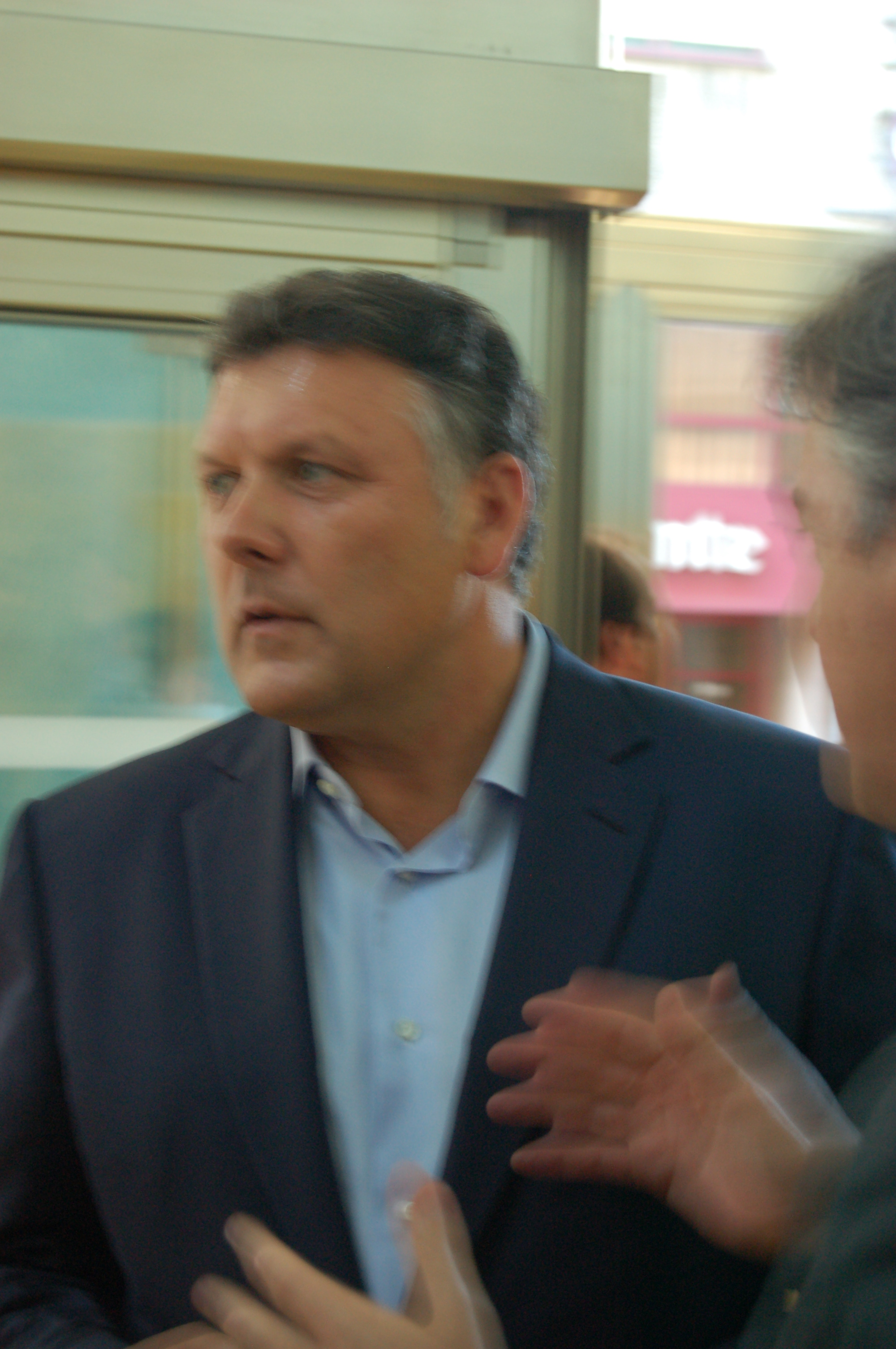 Telmo Martín González na sede de Caixanova de Pontevedra